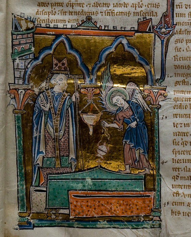 Miniatura no manuscrito Historia Compostellana, representación do descubrimento do sepulcro do apóstolo Santiago polo bispo Teodomiro cun anxo incensando e indicando cal é.